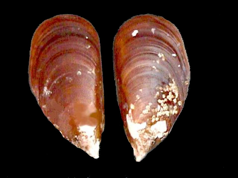 Perna perna (Mejillón) Bahía de Mochima, estado Sucre.